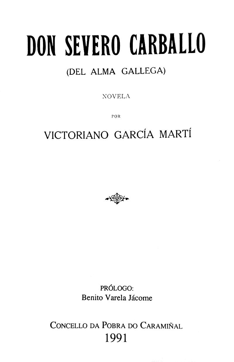 Don Severo Carballo (del alma gallega) novela por Victoriano García Martí